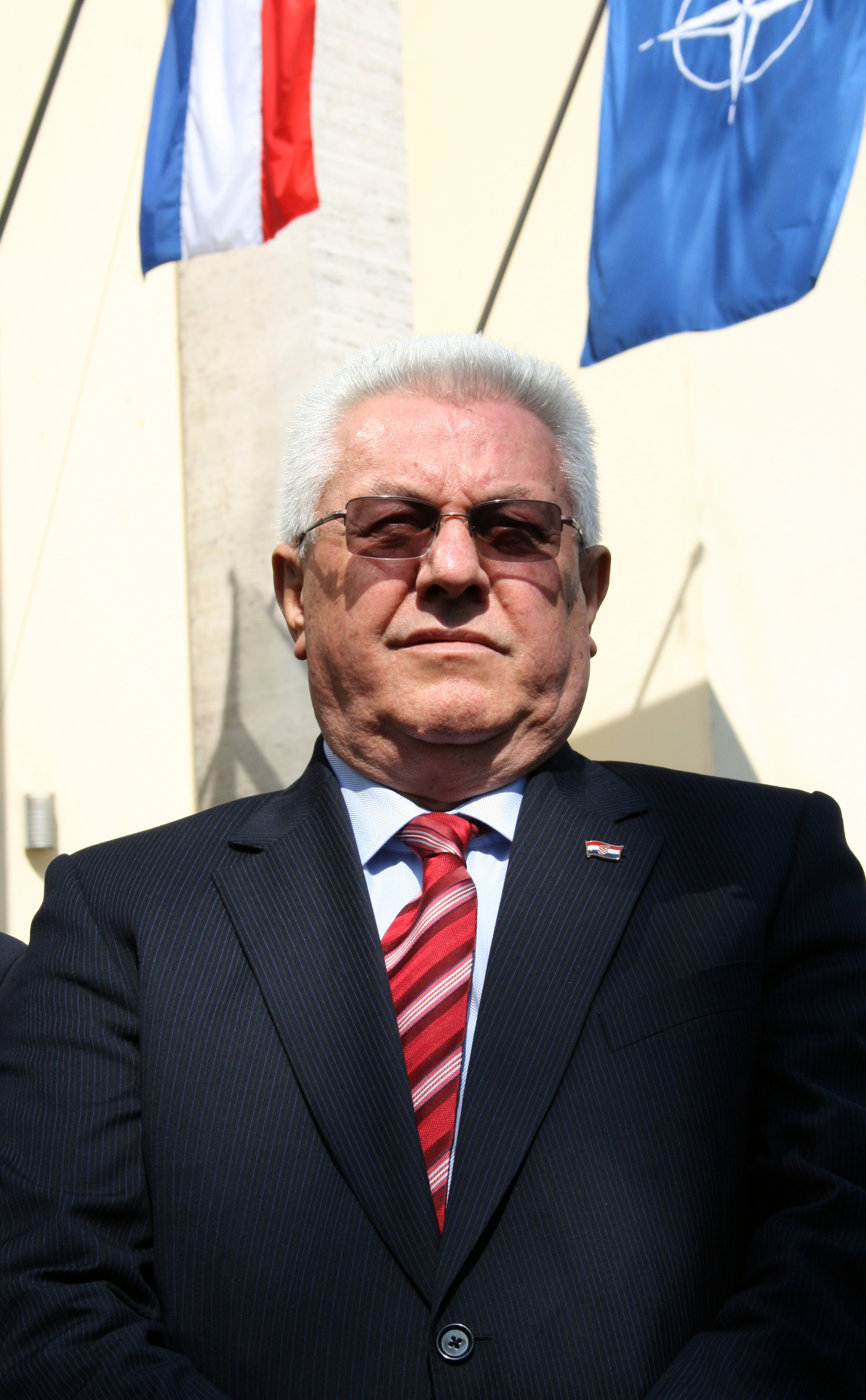 Luka Bebić; Svečanost podizanja NATO-ve zastave ispred zgrade MORH-a u Zagrebu.